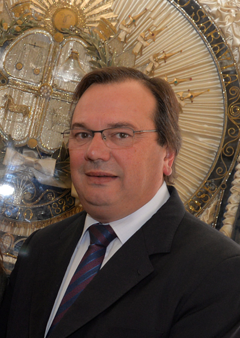 La Embajadora de los Estados Unidos en Uruguay, Kelly Keiderling realizó una visita oficial al Departamento de San José donde fue recibida por el Intendente Municipal José Luis Falero. [U.S. Embassy photo: Gonzalo García / Copyright info]